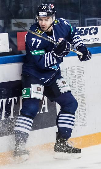 Защитник «Адмирала» Фёдор Беляков во время матча чемпионата КХЛ против хабаровского «Амура» 21 ноября 2014 года.